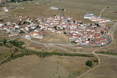 Tornadizos de Ávila